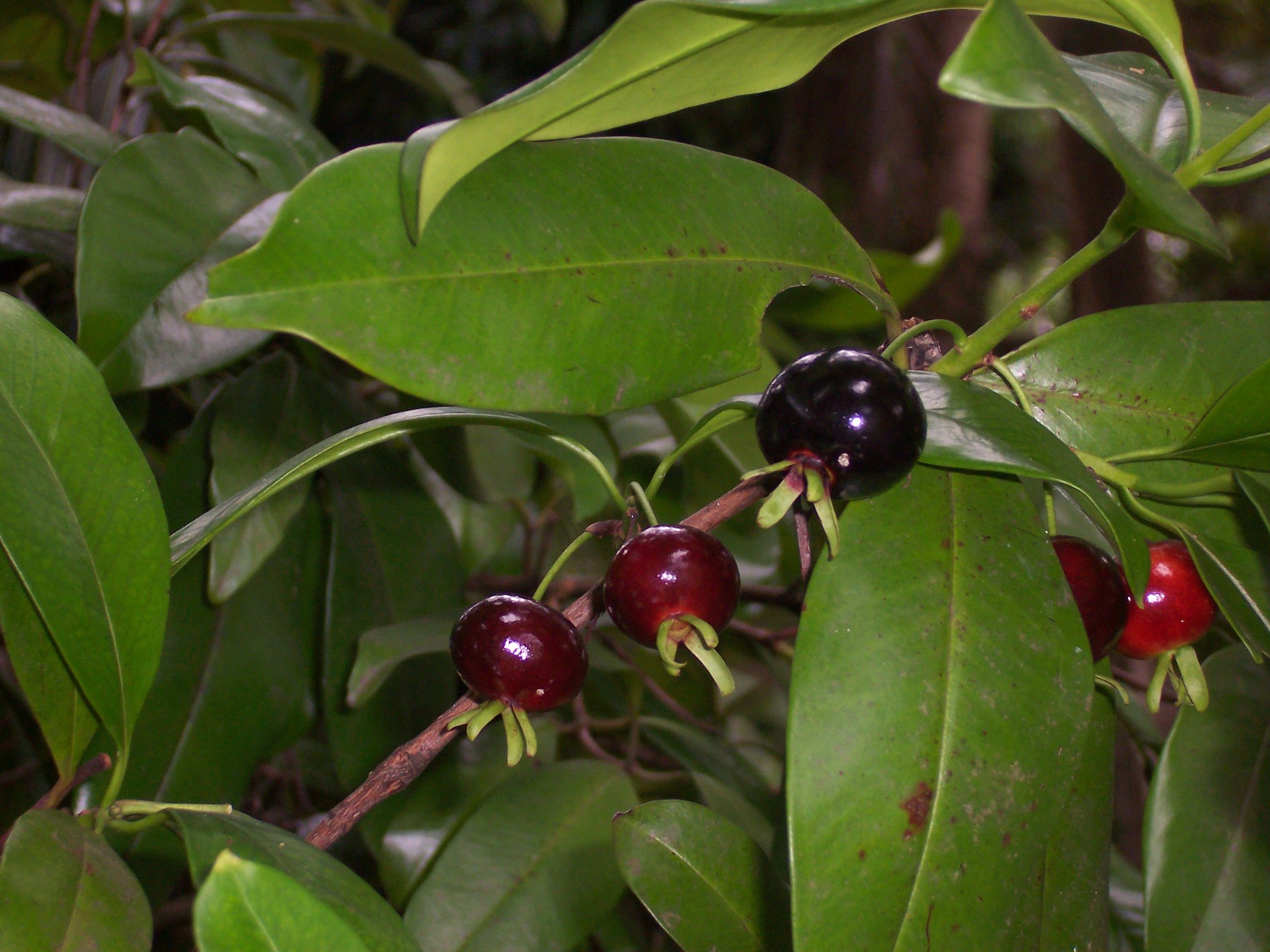 Cerisier du Brésil (Eugenia brasiliensis) Photo : B.navez - 22 FEB 2006 - Réunion island